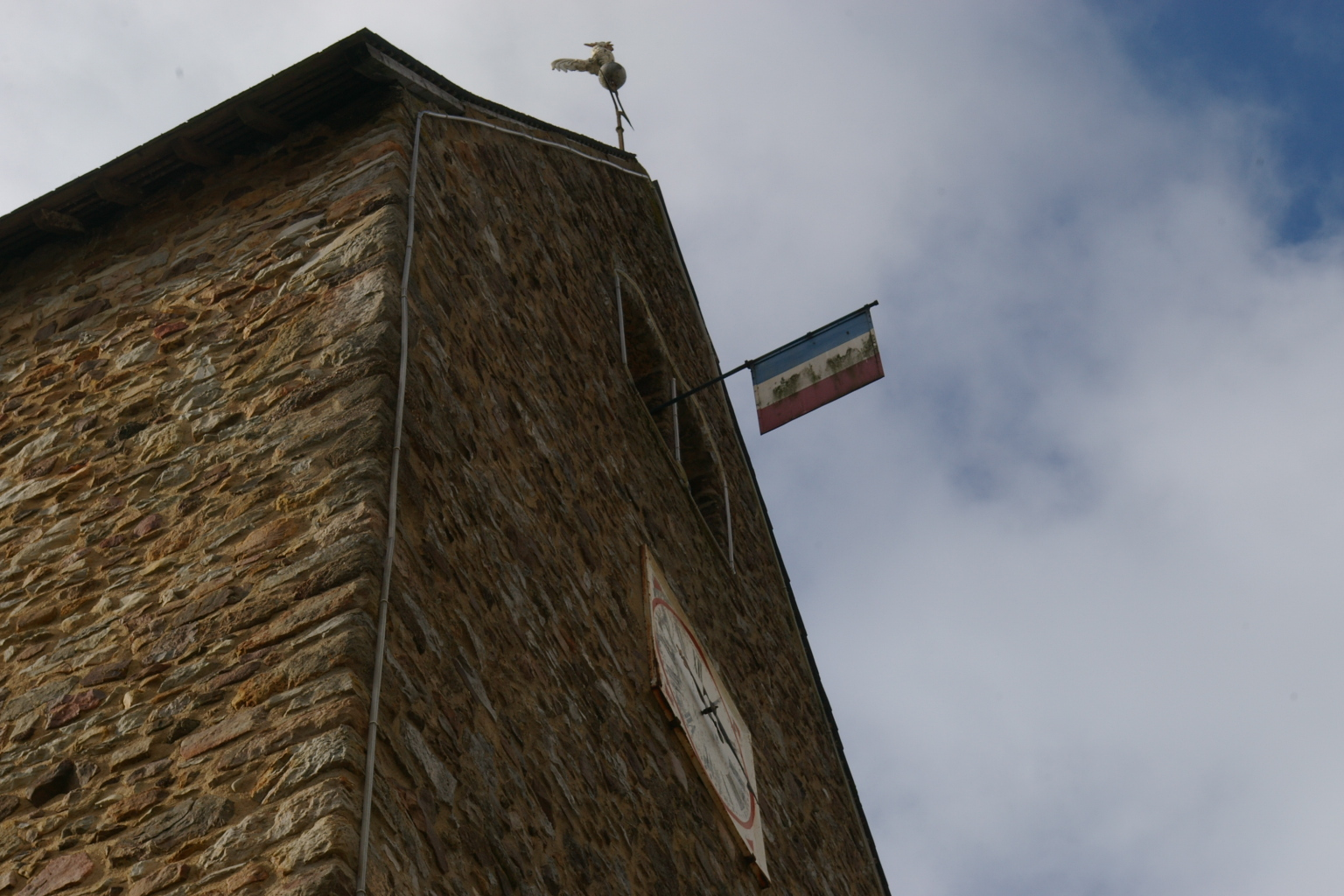 Tour-clocher de l'église de Thorigné-en-Charnie (Mayenne), France